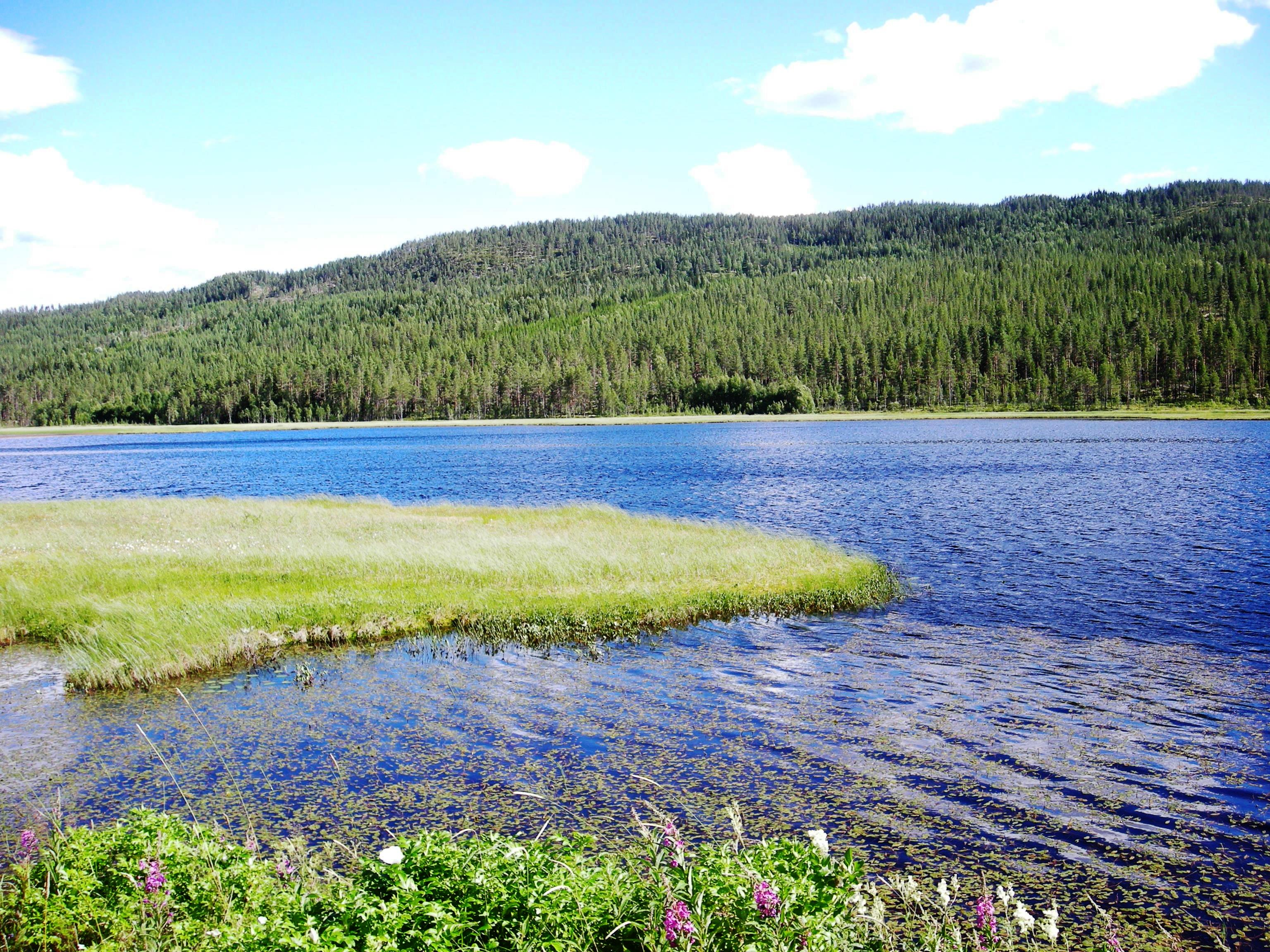 Kjemsjøen i Stor-Elvdal kommune, Hedmark